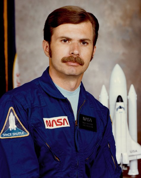 Dale A. Gardner